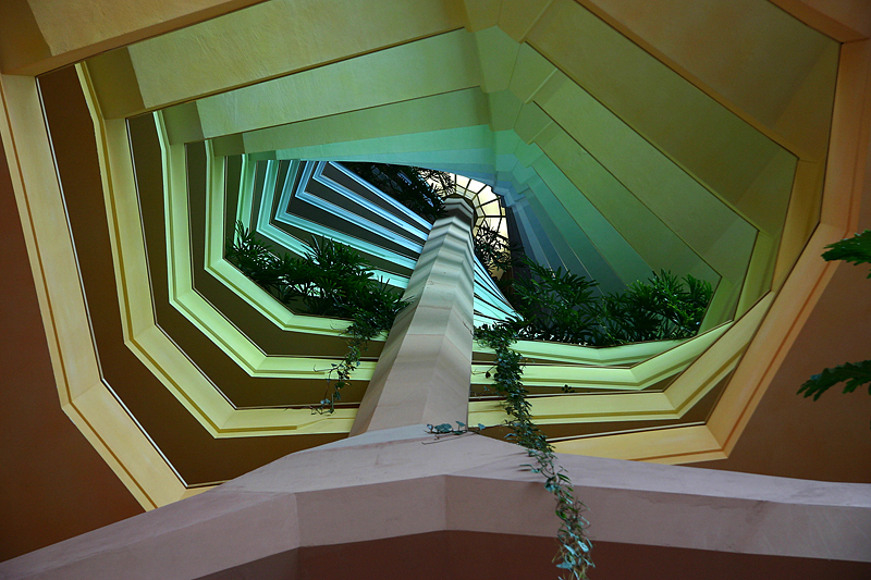 De Regenboogtrap, part of the Gasuniegebouw